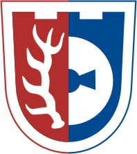 Kyšice (okres Kladno)